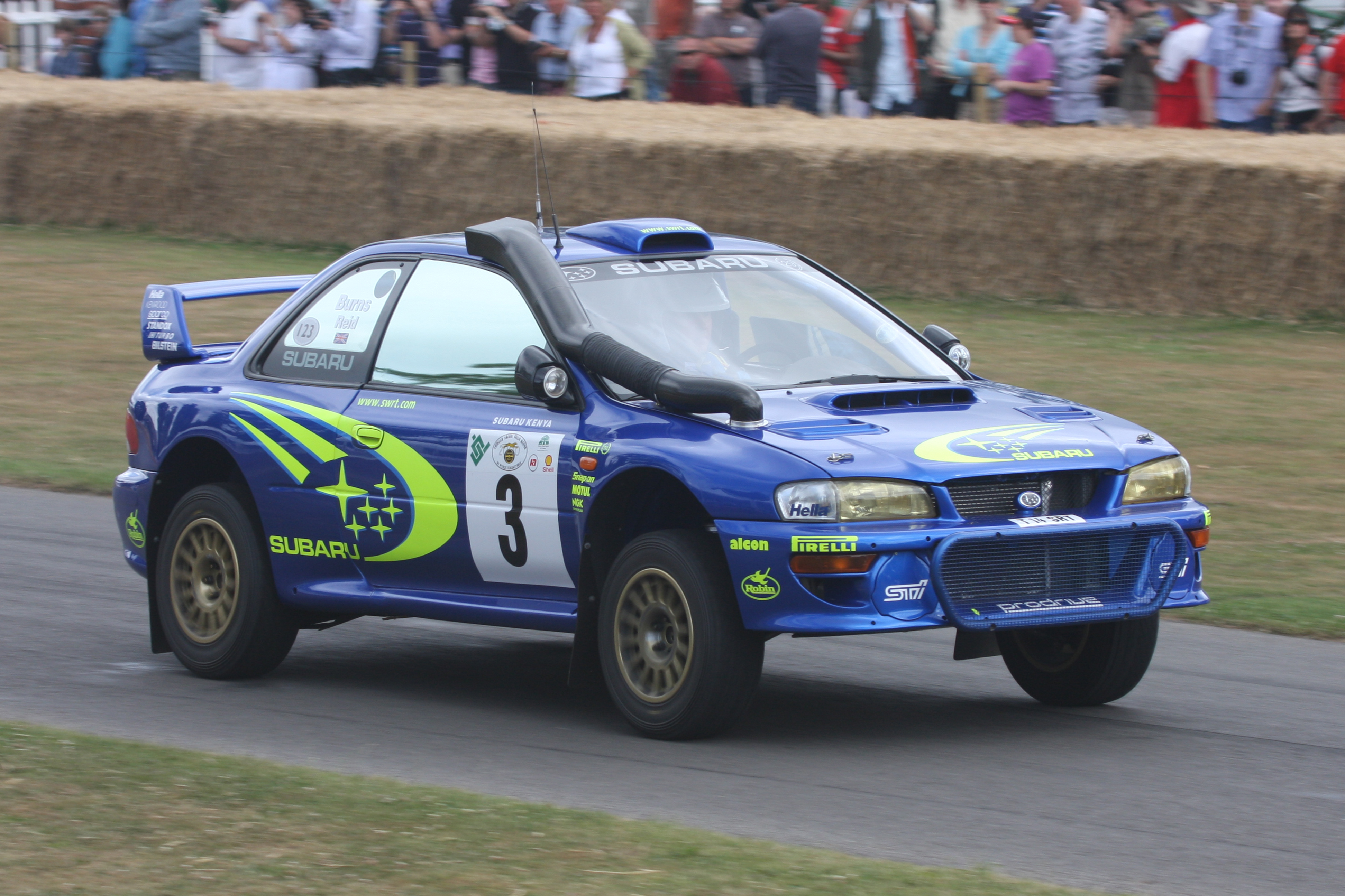 2000 Subaru Impreza WRC